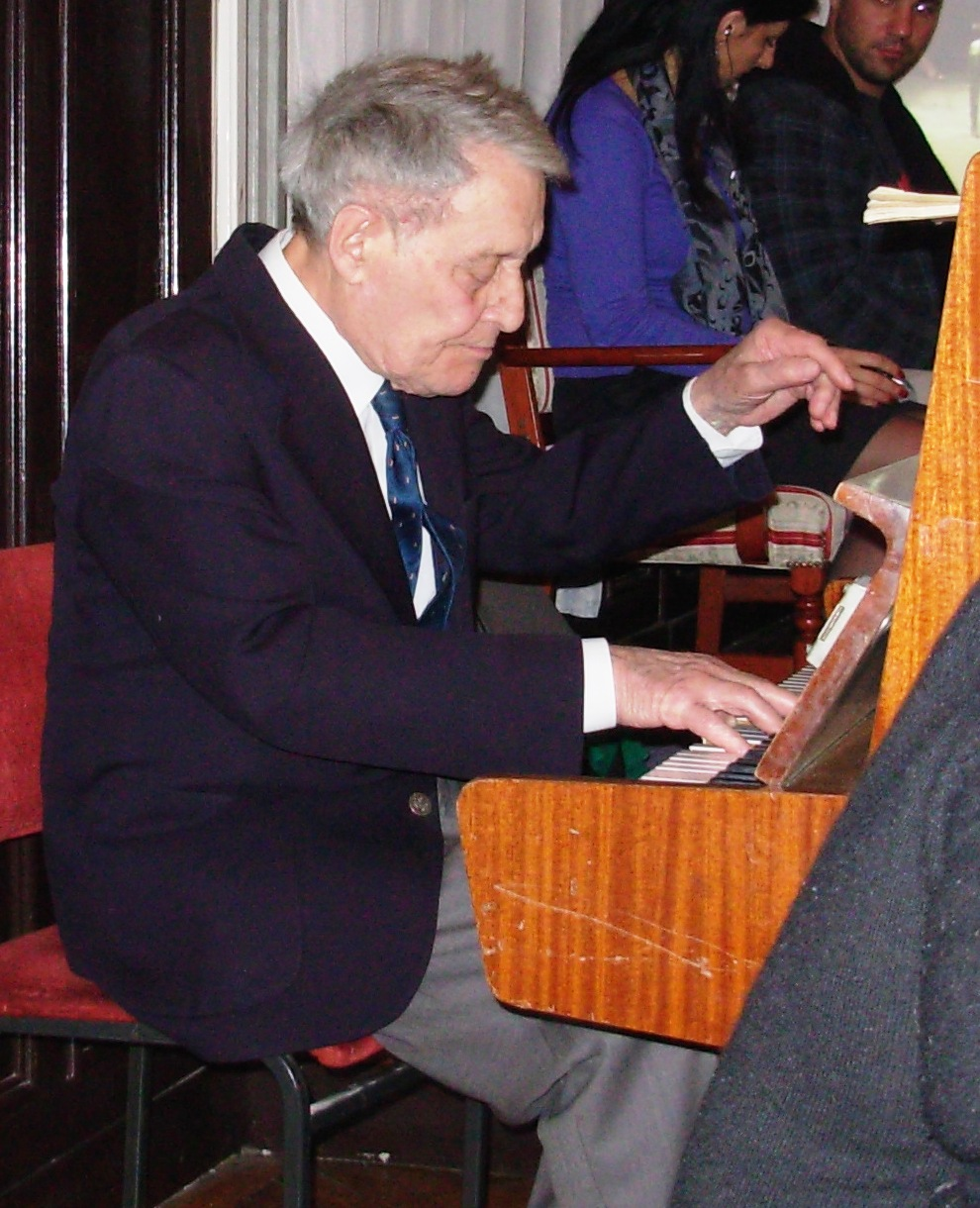 Andreja Preger svira na svom 99 rođendanu! Snimio Goldfinger